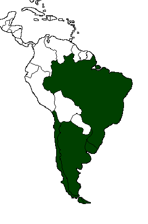 Clasificados de la Conmebol para la Copa Mundial de Fútbol de 1966